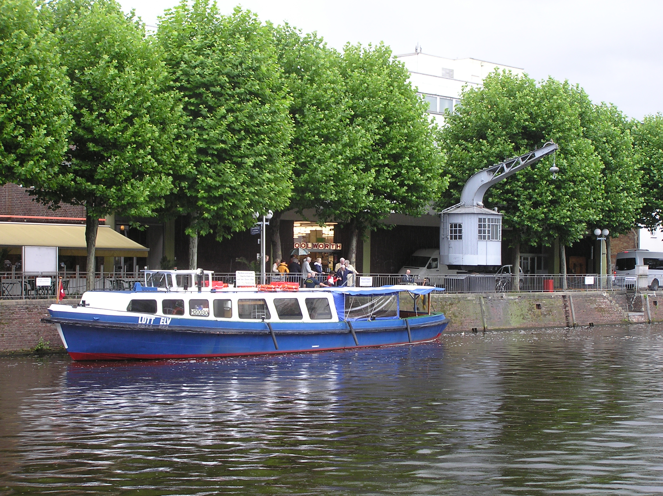 Barkasse und alter Krahn im Serrahn (Bille-Hafen von Bergedorf).